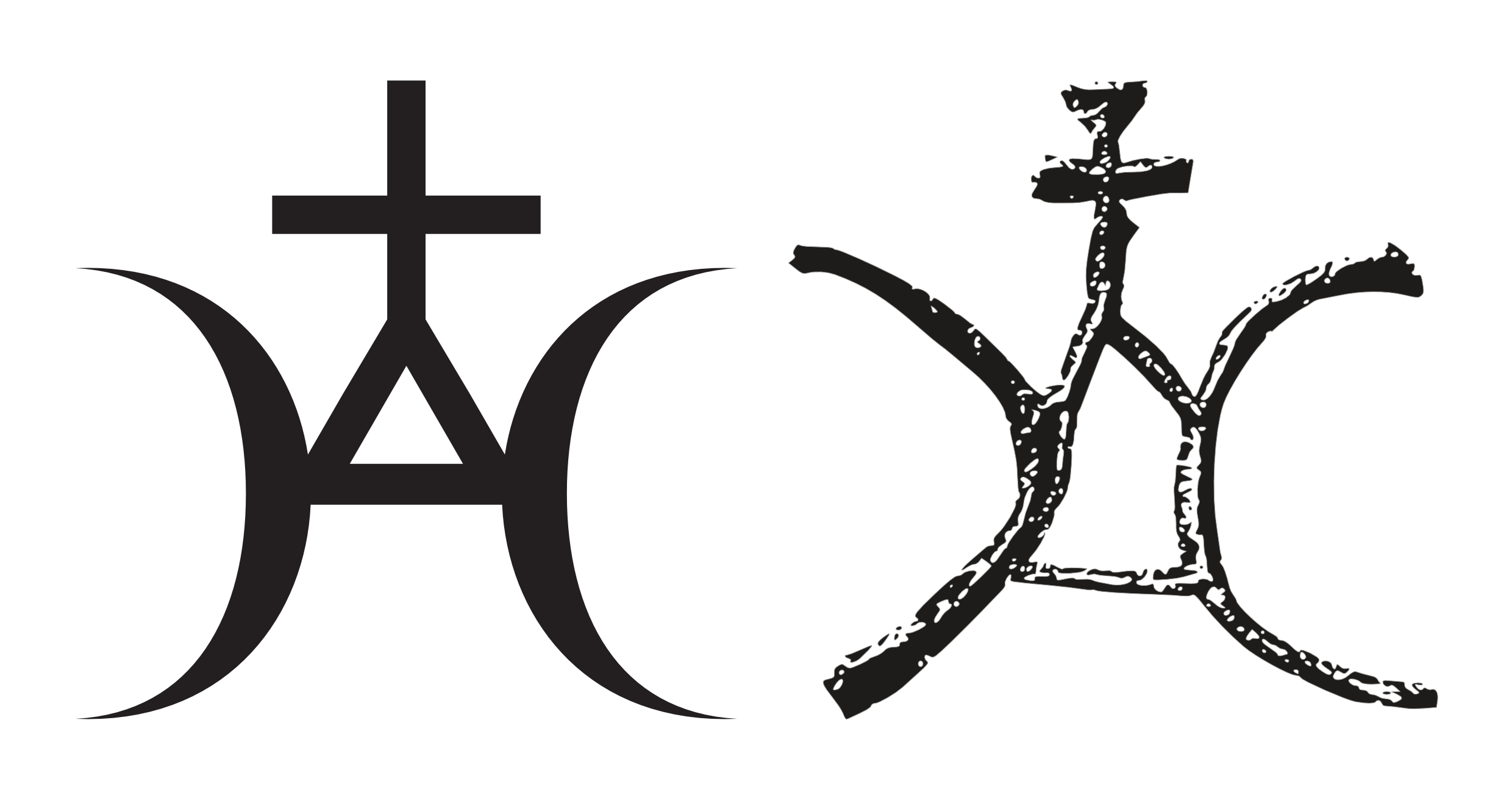 Porównanie godeł herbów - Iziasławiczów, ks. połockich i Ostoi Mikołaja ze Ściborzyc. Godło herbu Iziasławiczów, ks. połockich zostało opublikowane w: O. Odnorożenko, "Ukraińska i ruska elita", Kijów 2011, s. 27-28.